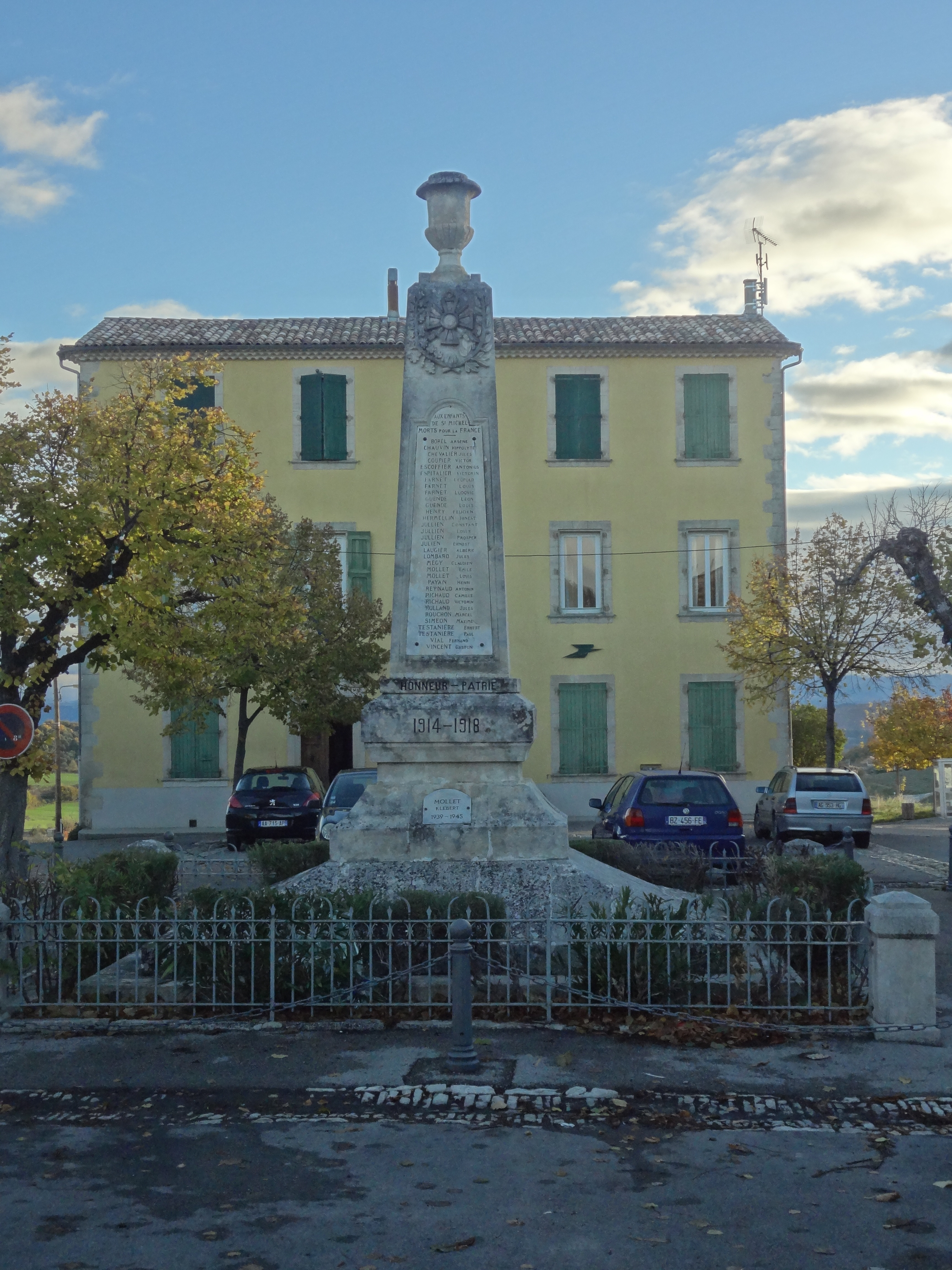 Un des noms est celui d’un homme fusillé pour l'exemple